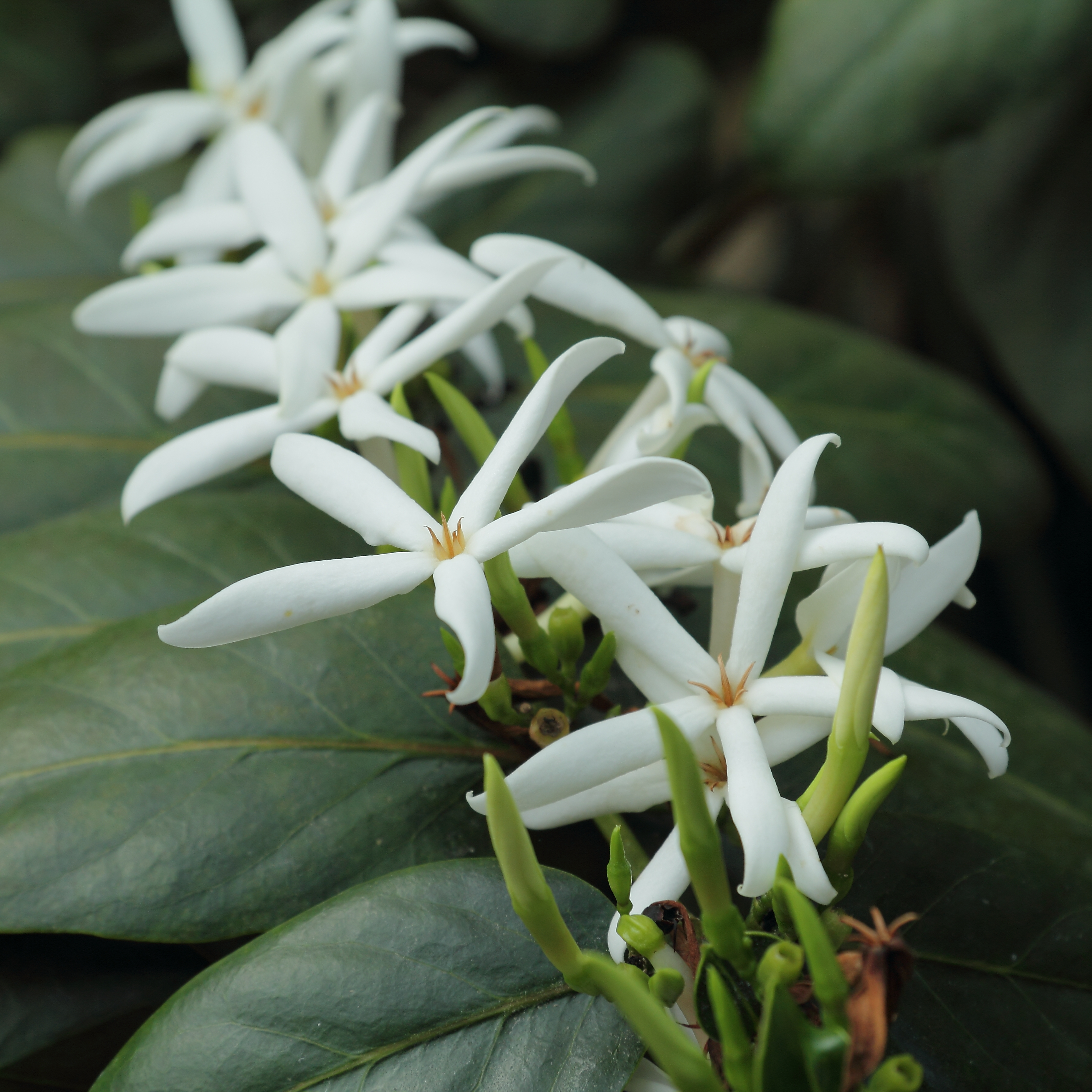 Ramosmania rodriguesii, identifierad med hjälp av befintlig skylt vid Kew Gardens, London.